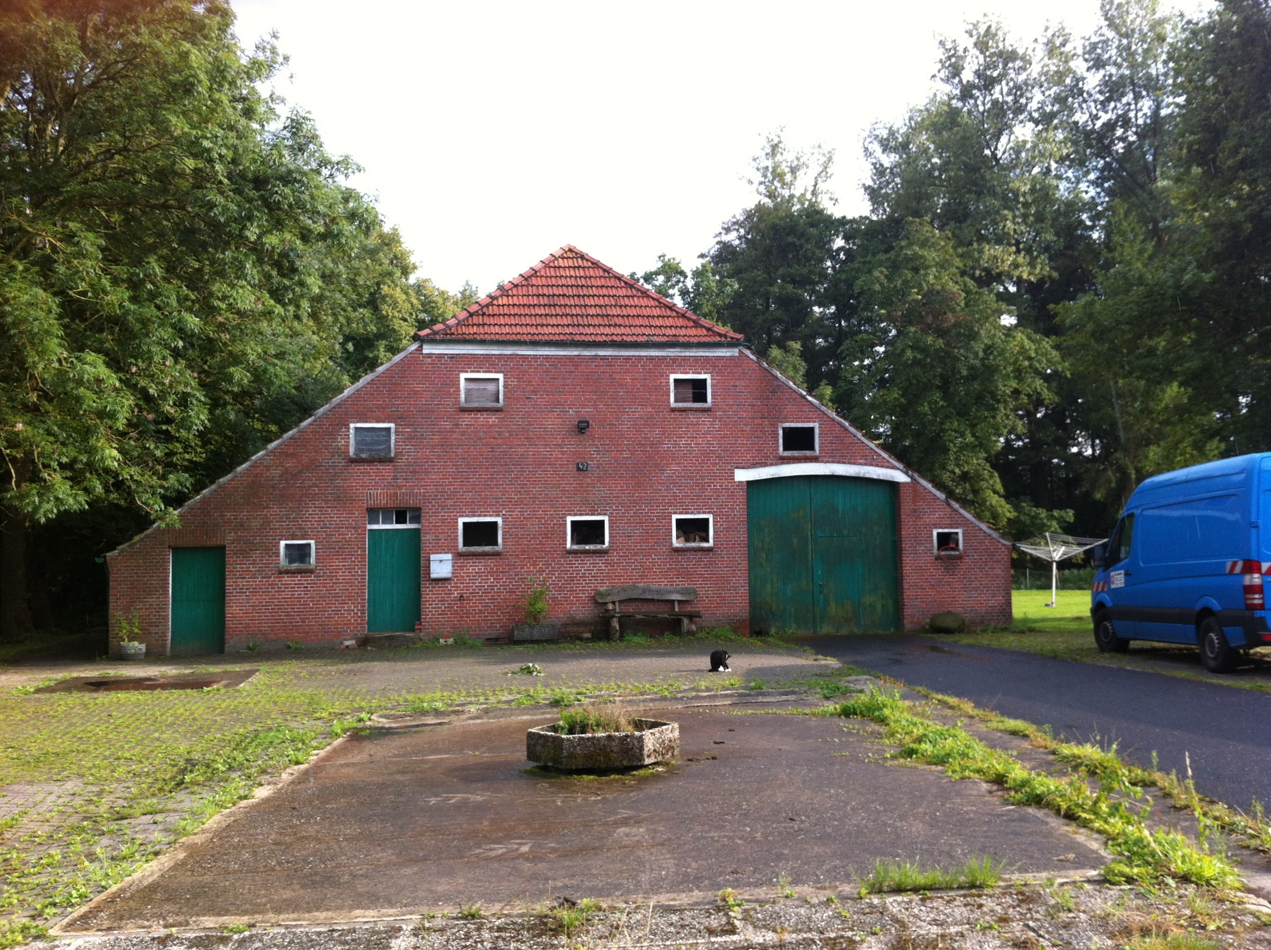 Hof Hündling 44, Bahnhofstraße, Ihrhove, Gemeinde Westoverledingen, Landkreis Leer, Niedersachsen, Deutschland